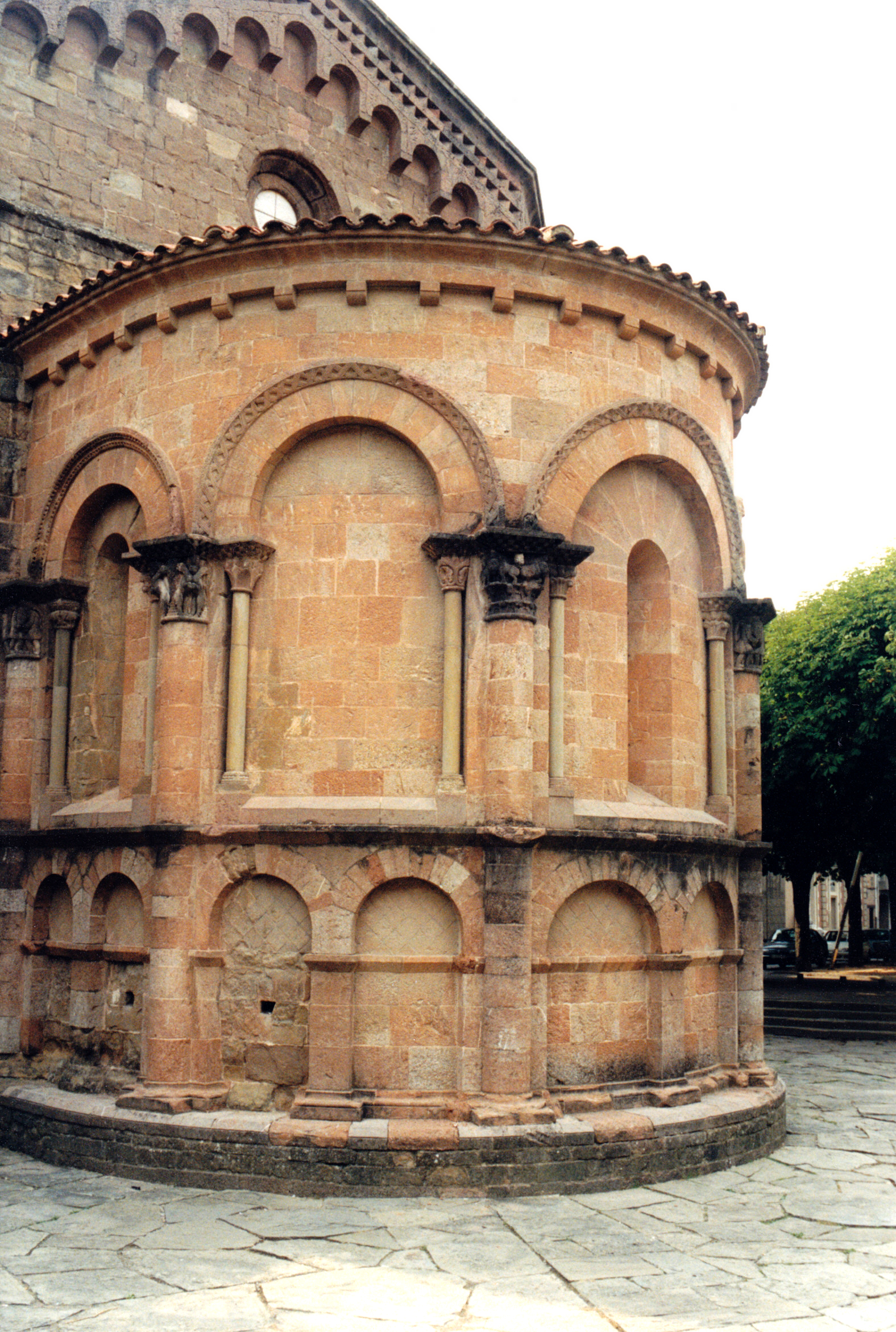 Monestir de Sant Joan de les Abadesses al Ripollès